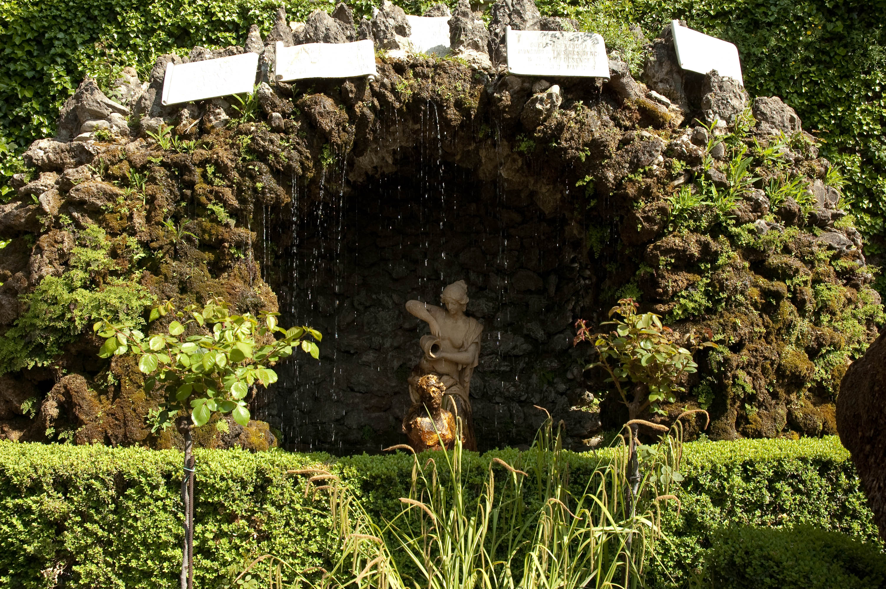 Jardín de El carmen de los Mártires (Granada) detalle de una de las fuentes